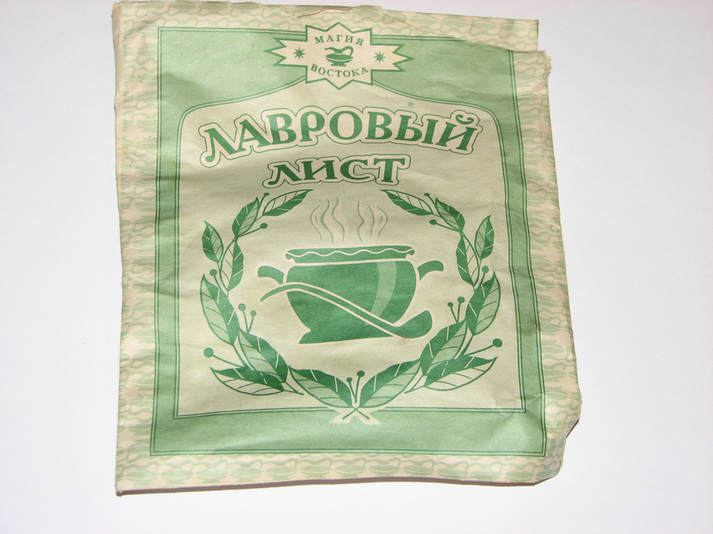 Лавровый лист